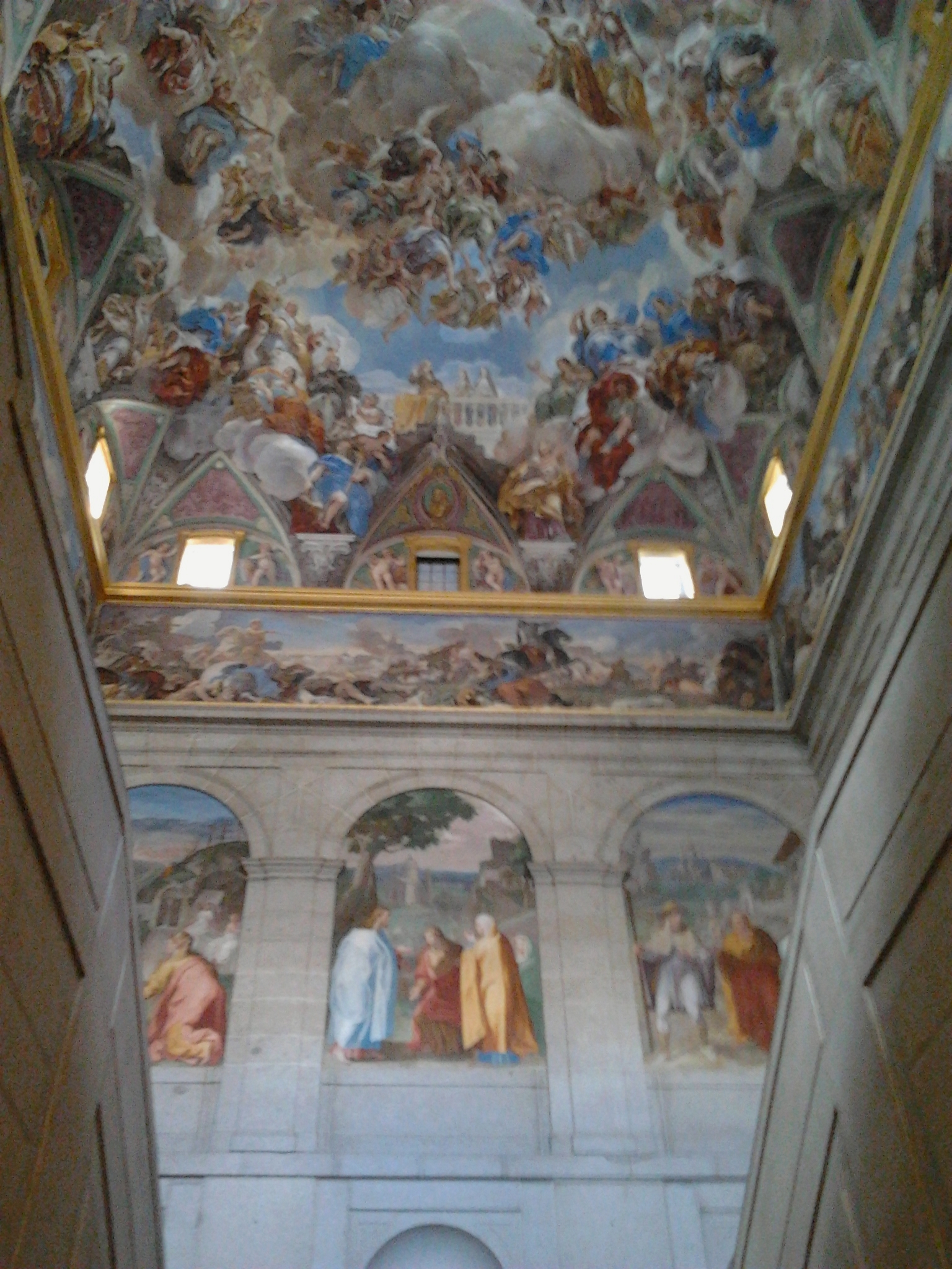 Main staircase of the Escorial Monastery with frescoes by Luca Giordano.label QS:Len,"Main staircase of the Escorial Monastery with frescoes by Luca Giordano." label QS:Lpl,"Schody główne klasztoru w Eskurialu z freskami Luca Giordano." label QS:Lfr,"Escalier principal du monastère de l'Escorial avec des fresques de Luca Giordano."